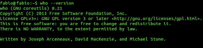 Whounix